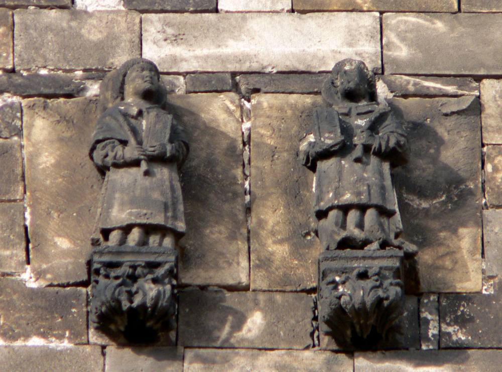 Escultures dels sants Just i Pastor, a la torre campanar de l'església de Sant Just de Barcelona.